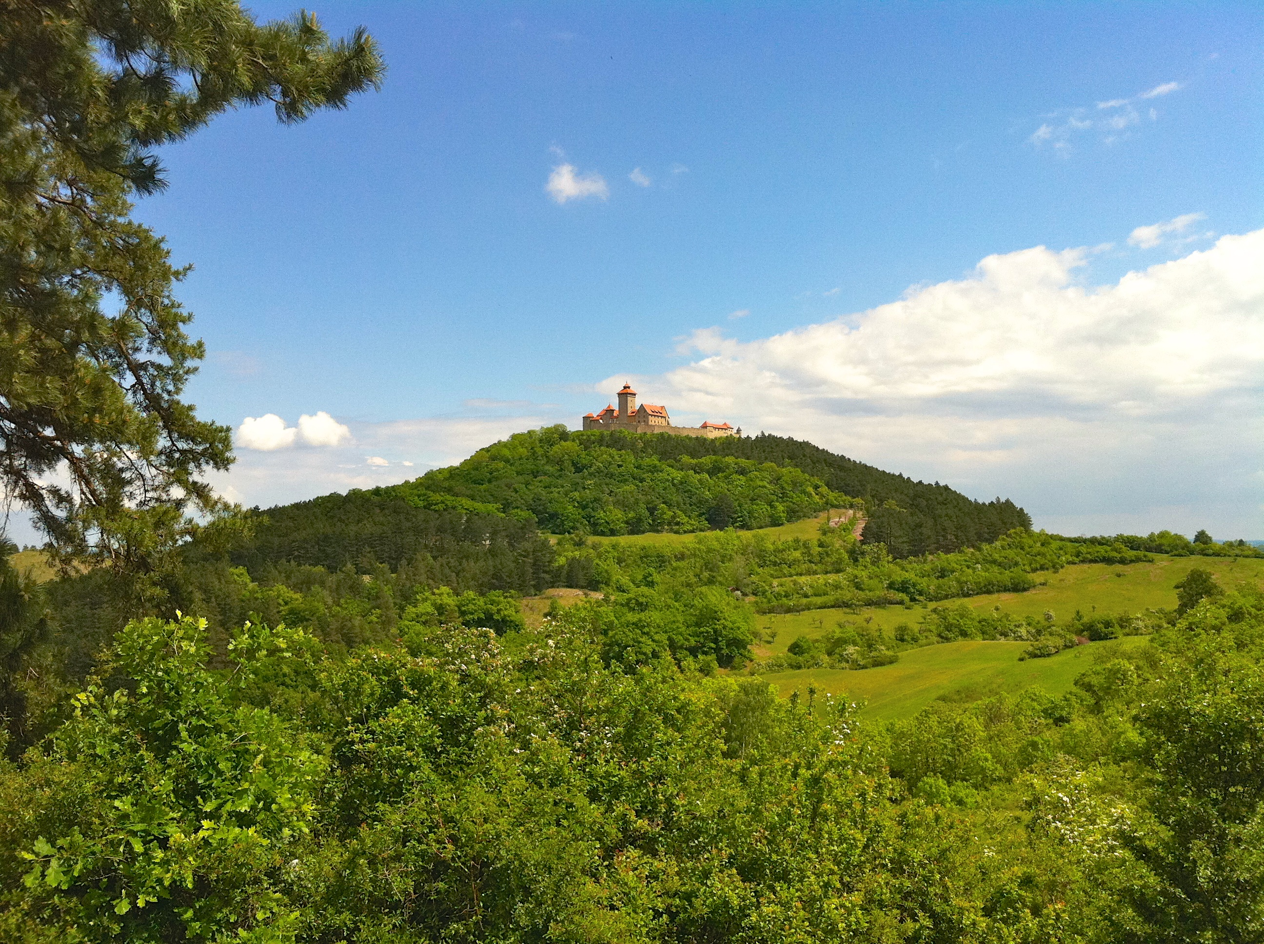 Das Bild zeigt in der Mitte das Naturschutzgebiet „Wachsenburg“ mit der Wachsenburg (Gipfelbereich nicht im NSG); Blick vom Wanderweg der Drei-Burgen-Wanderung aus Richtung der Mühlburg kommend.